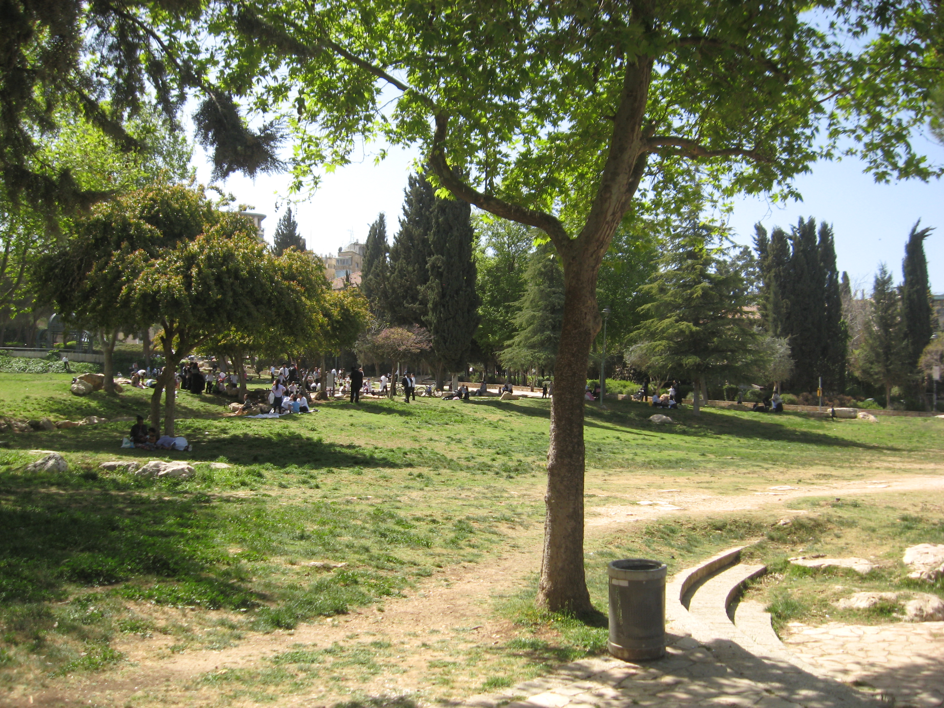 Иерусалим. Парк Независимости.